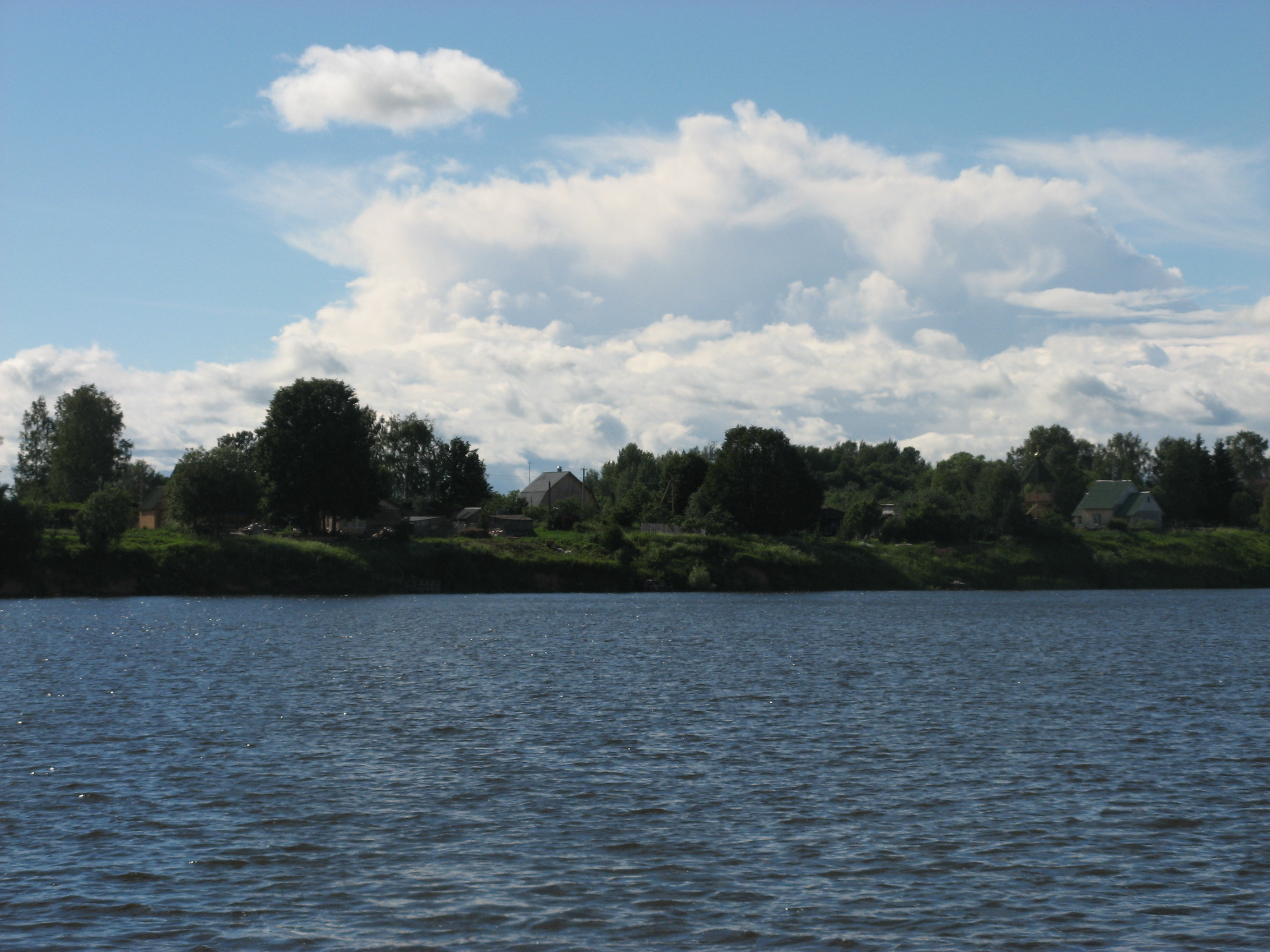 Вид на Хлепень и Вазузское водохранилища с мостового перехода через водохранилище.